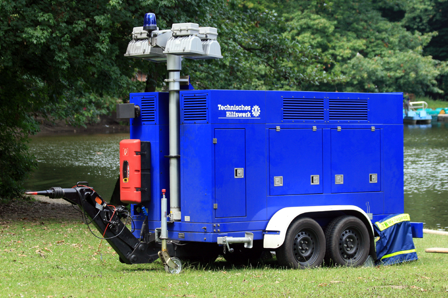 Netzersatzanlage (NEA), als Anhänger mit Lichtmast, des THW